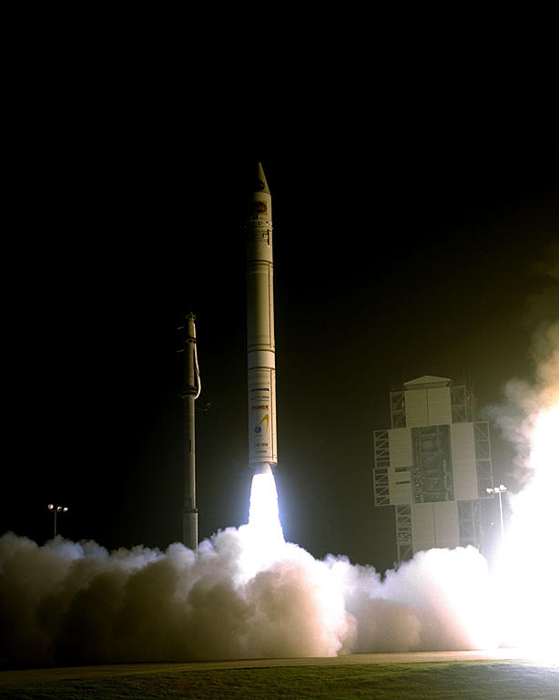 Lunar Prospector beim Start ins All